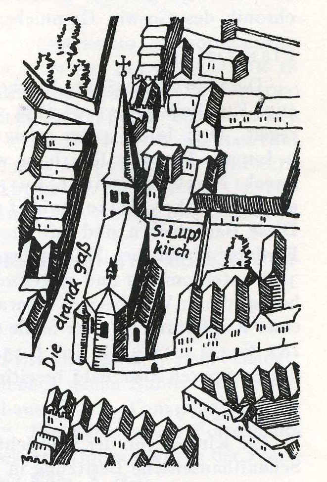 Stadtansicht nach Mercator 157. Ausschnitt St. Lupus